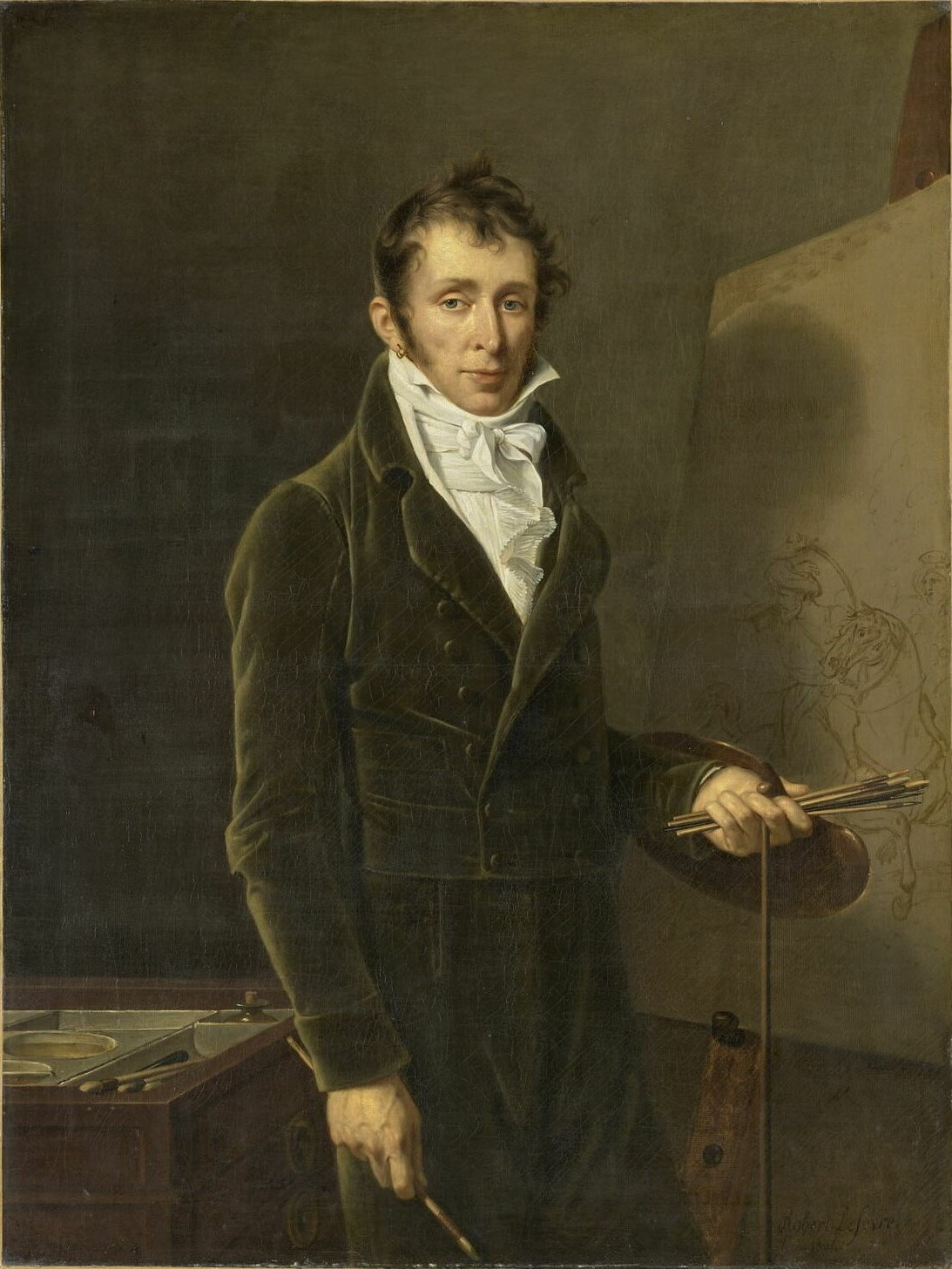 Vernet, Carle; franz.Maler; Bordeaux 14.8.1758-Paris 21.11.1836.-Porträt des Malers Carle Vernet.